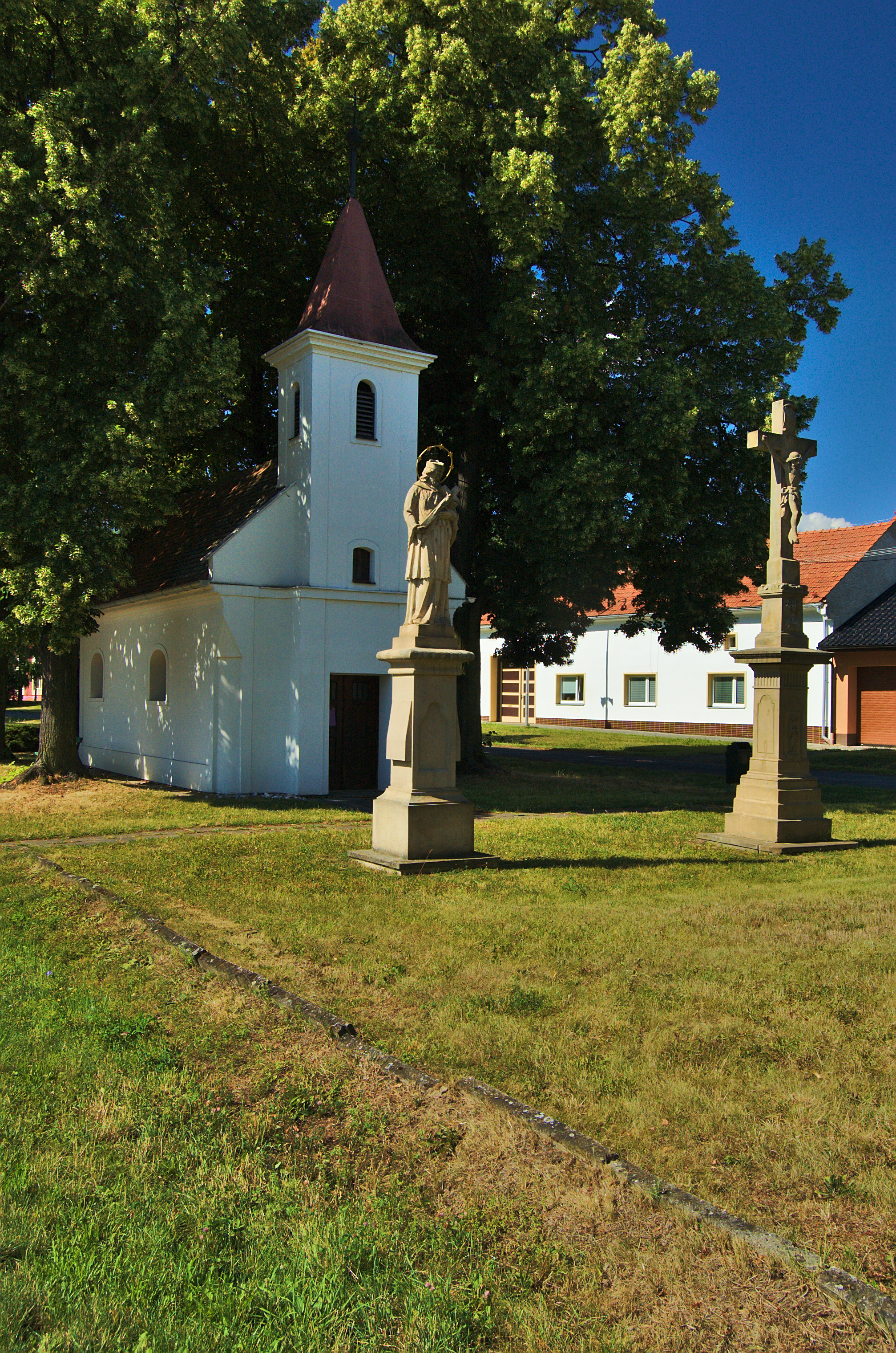 Kaple svaté Anny, Čechovice, Prostějov